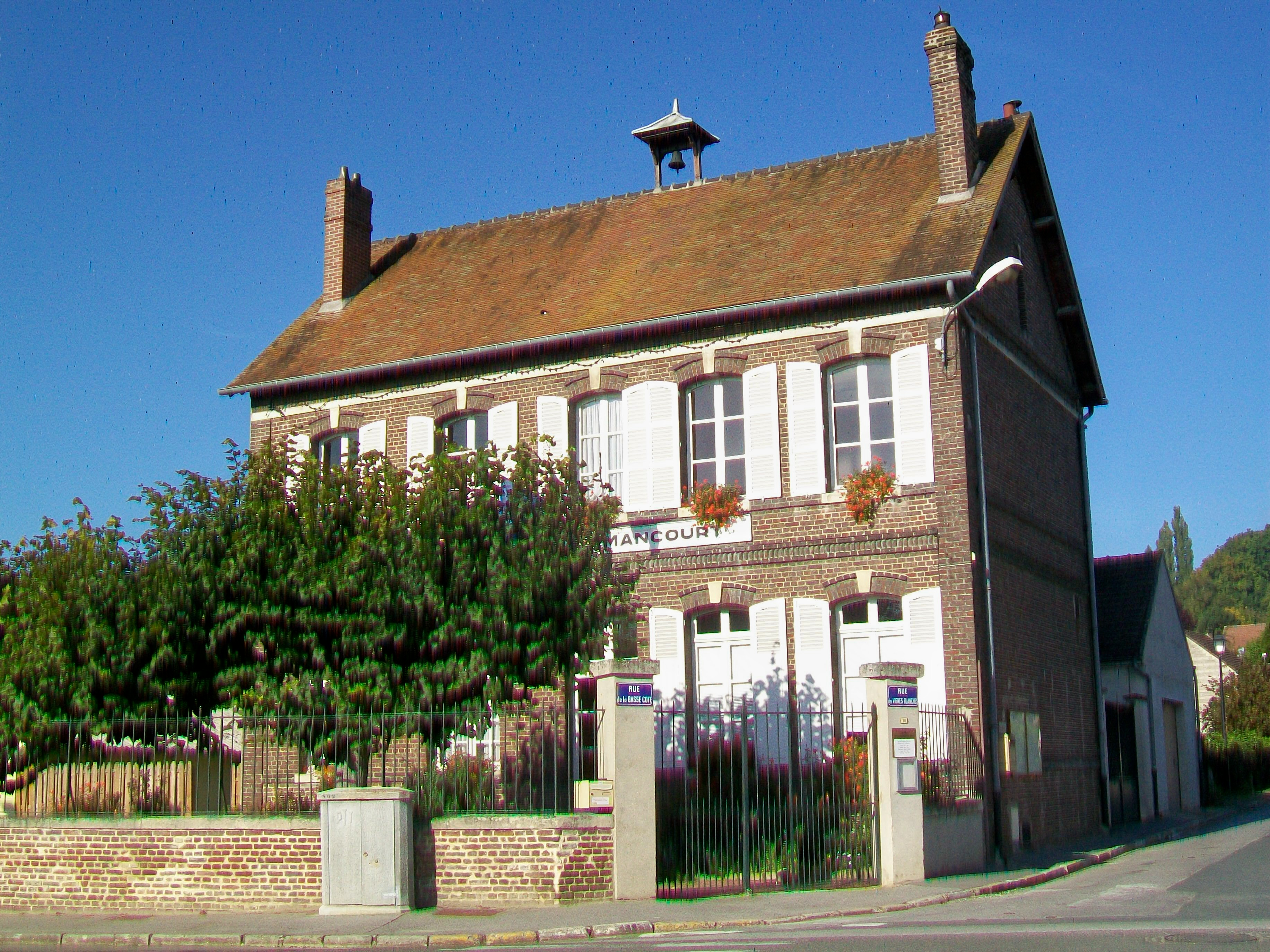 La mairie, rue de la Basse-Côte (RD 13), à l'angle avec la rue des Vignes blanches.